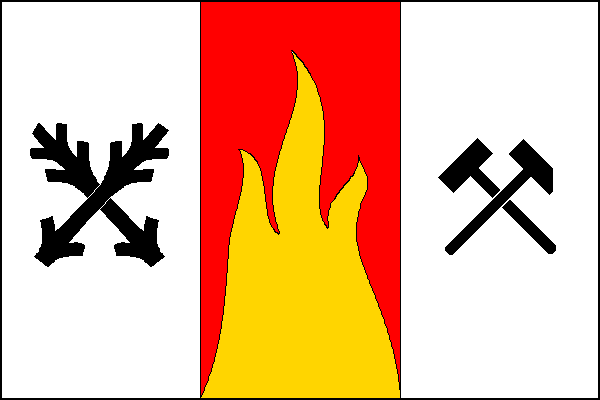 vlajka, Dolní Rožínka, okres Žďár nad Sázavou